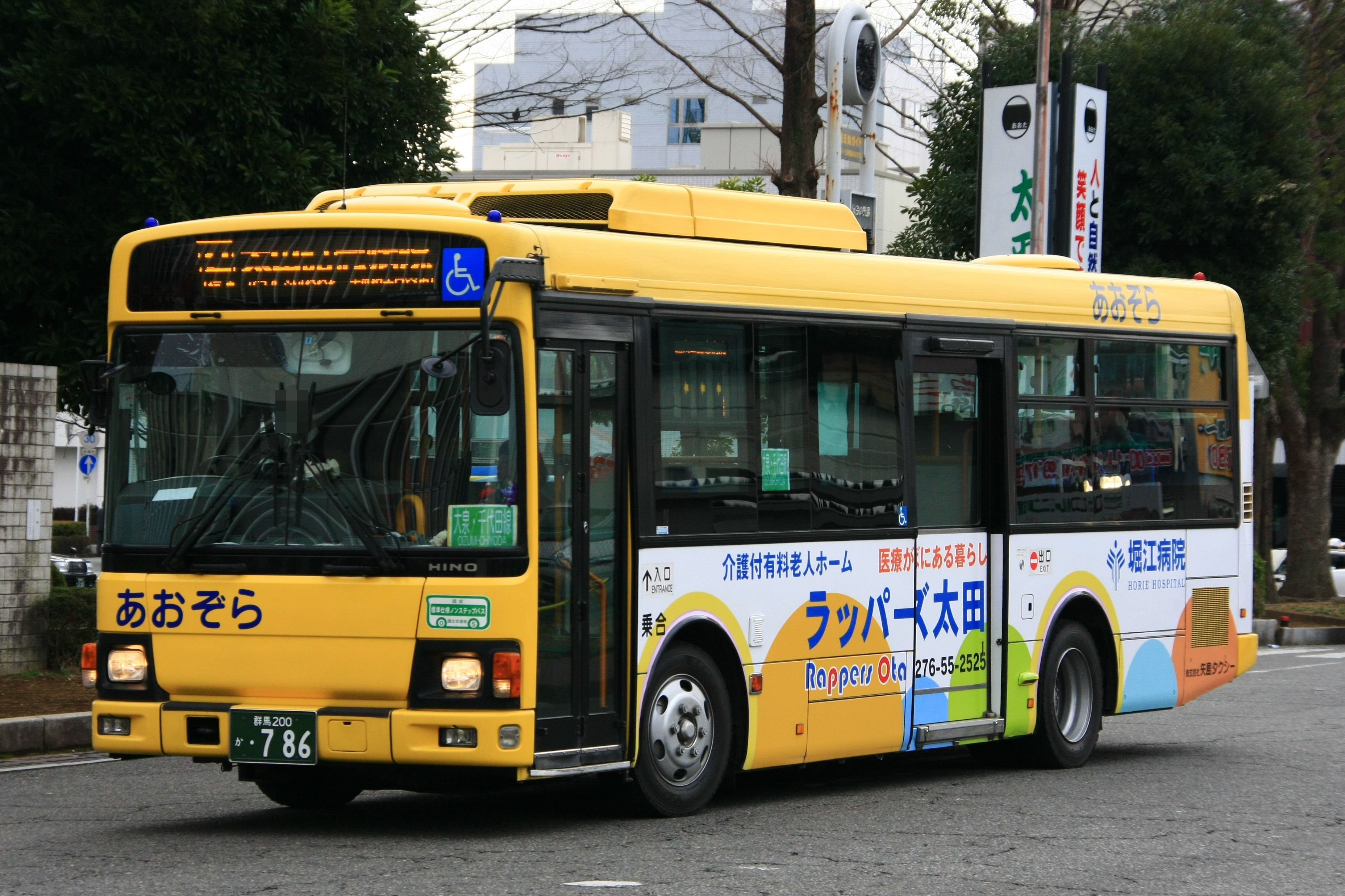 株式会社矢島タクシーが千代田町役場前～太田記念病院間で運行しているコミュニティバス「広域公共バスあおぞら」。またそれに使用される日野・レインボーⅡ。